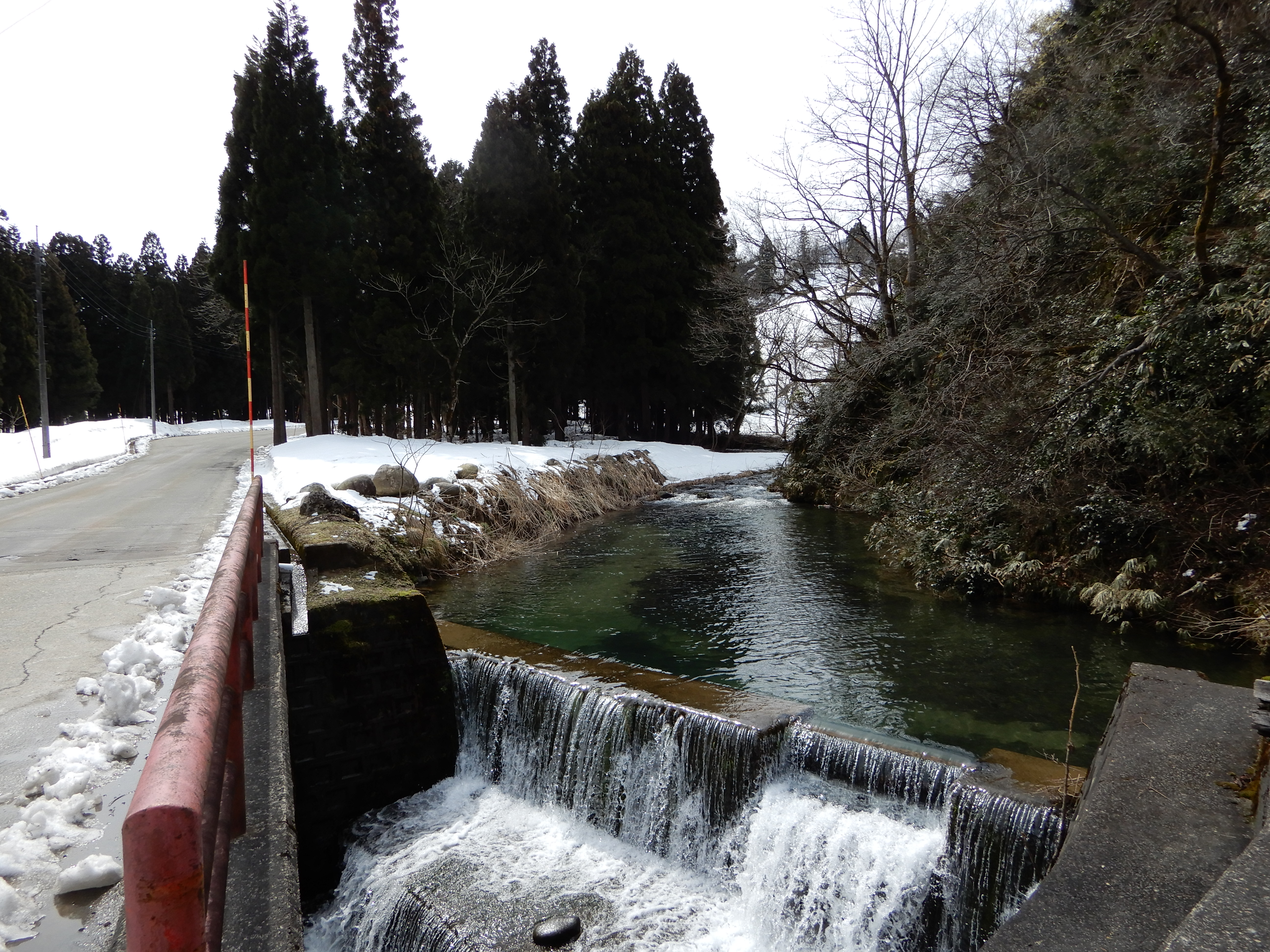 小松沢川下流 2019-03-26